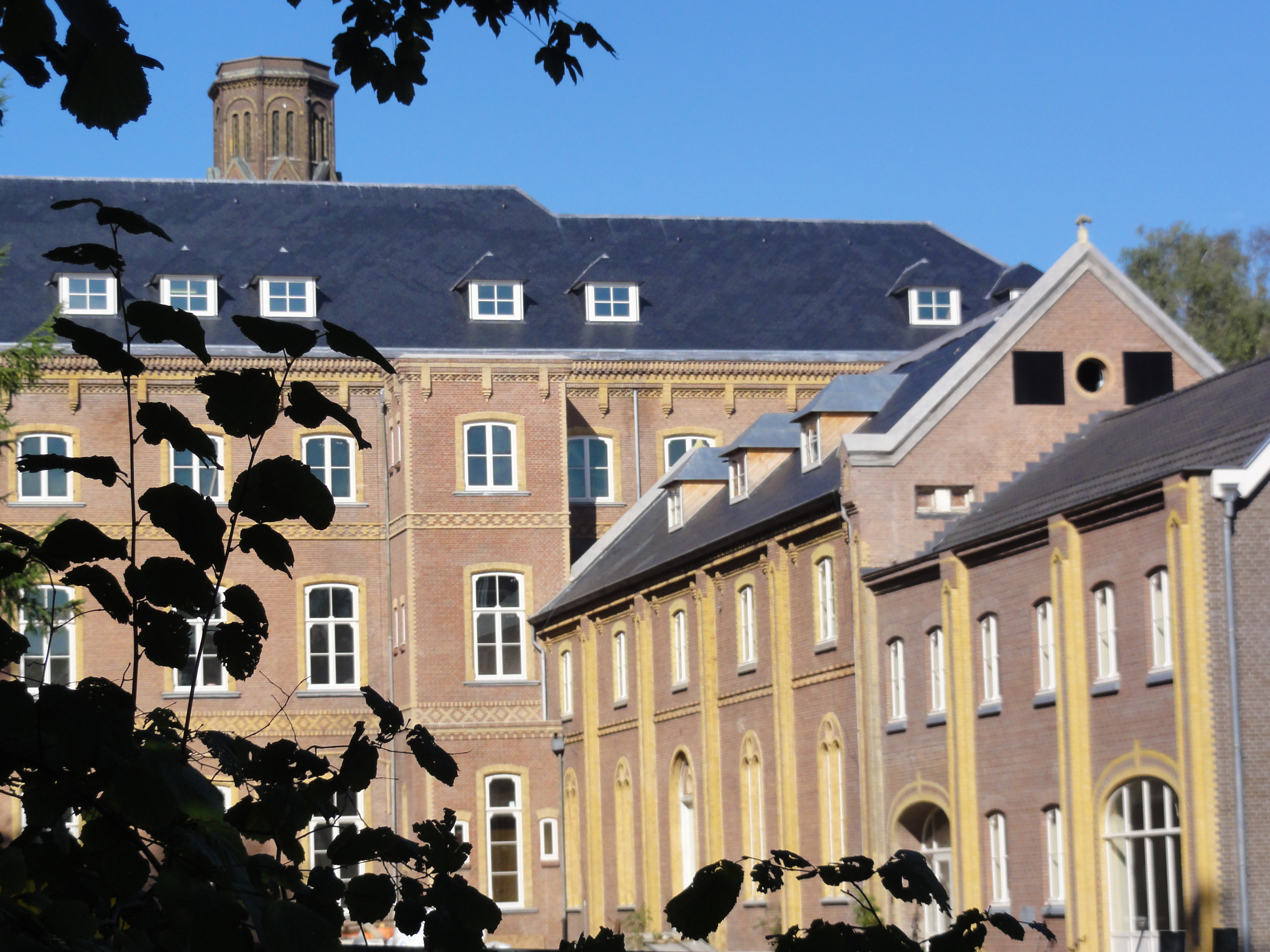 Velp (Grave) Rijksmonument 514139 keukenvleugel voormalig Jezuïetenklooster Mariendaal, daarna voormalig GGZ-instelling De Binckhof, in 2010-2011 inwendig verbouwd tot appartementencomplex. Gebouw tussen 1862-'65 gerealiseerd